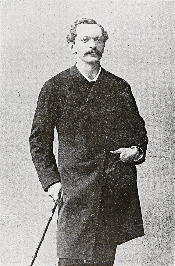 Miguel Antonio Varas Herrera; abogado y político chileno. Nació en Santiago, el 11 de agosto de 1847. Murió el 28 de octubre de 1922. Hijo de Antonio Varas de la Barra y de Irene Herrera Bustamante. Casado con Clotilde Velásquez.